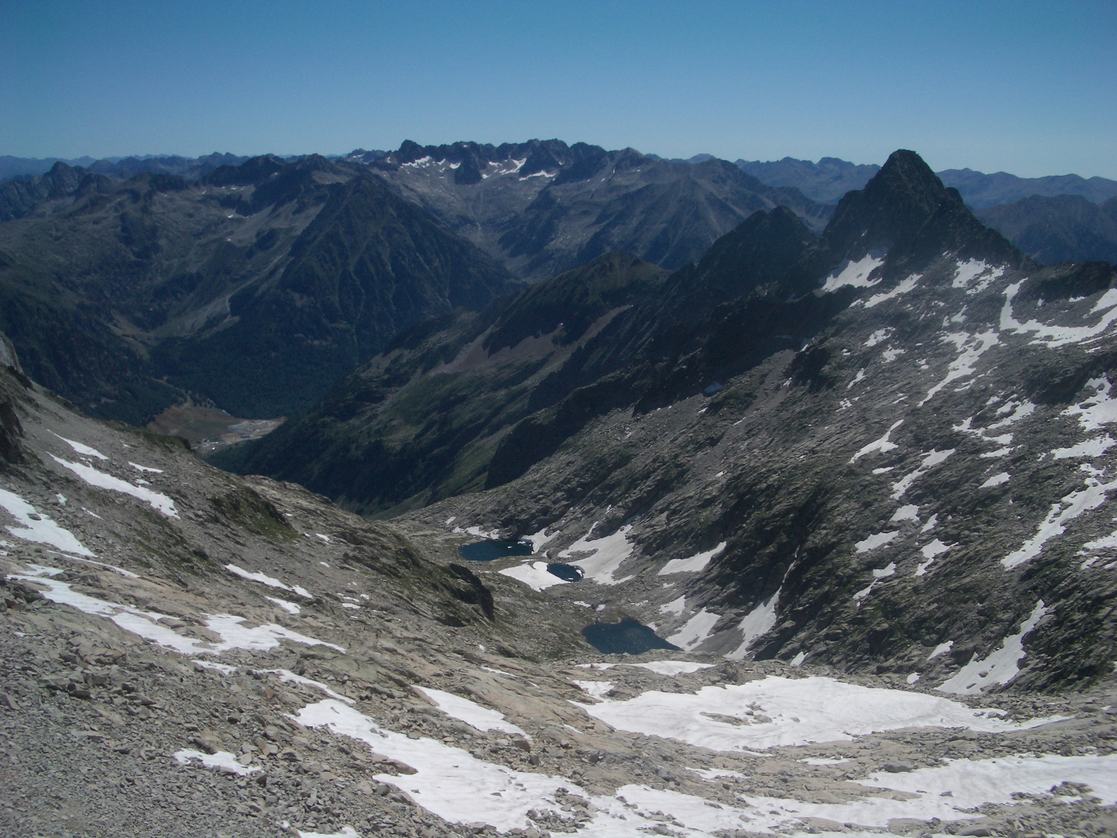 Vista del Valle de Mulleres This is a a photo of a wetland in Catalonia, Spain, with id: IZHC-17000525 This is a a photo of a natural area in Catalonia, Spain, with id: ES510088